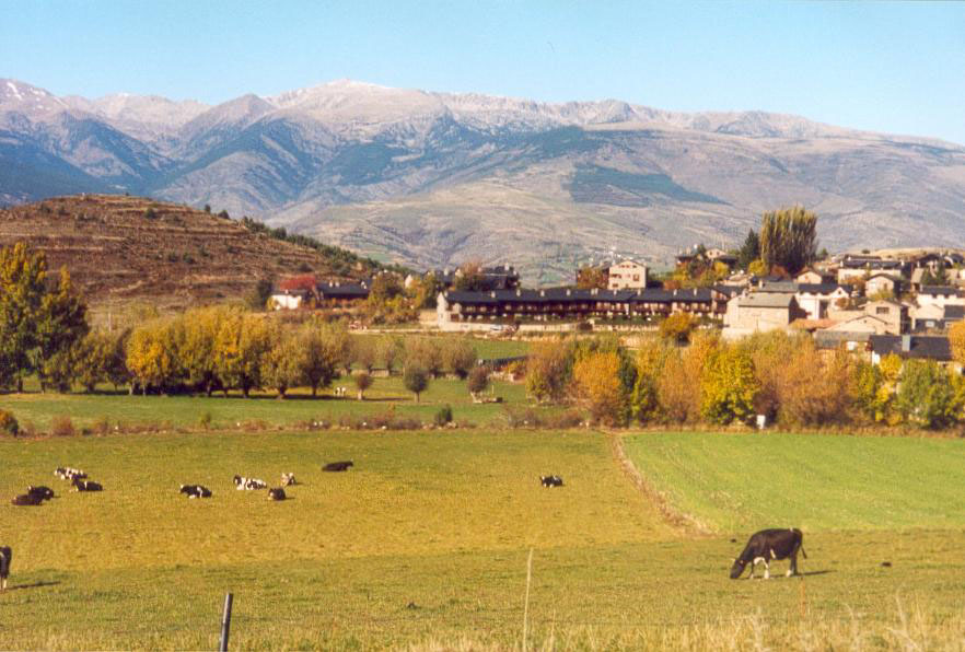 Urús, a la comarca de La Cerdanya, Catalunya